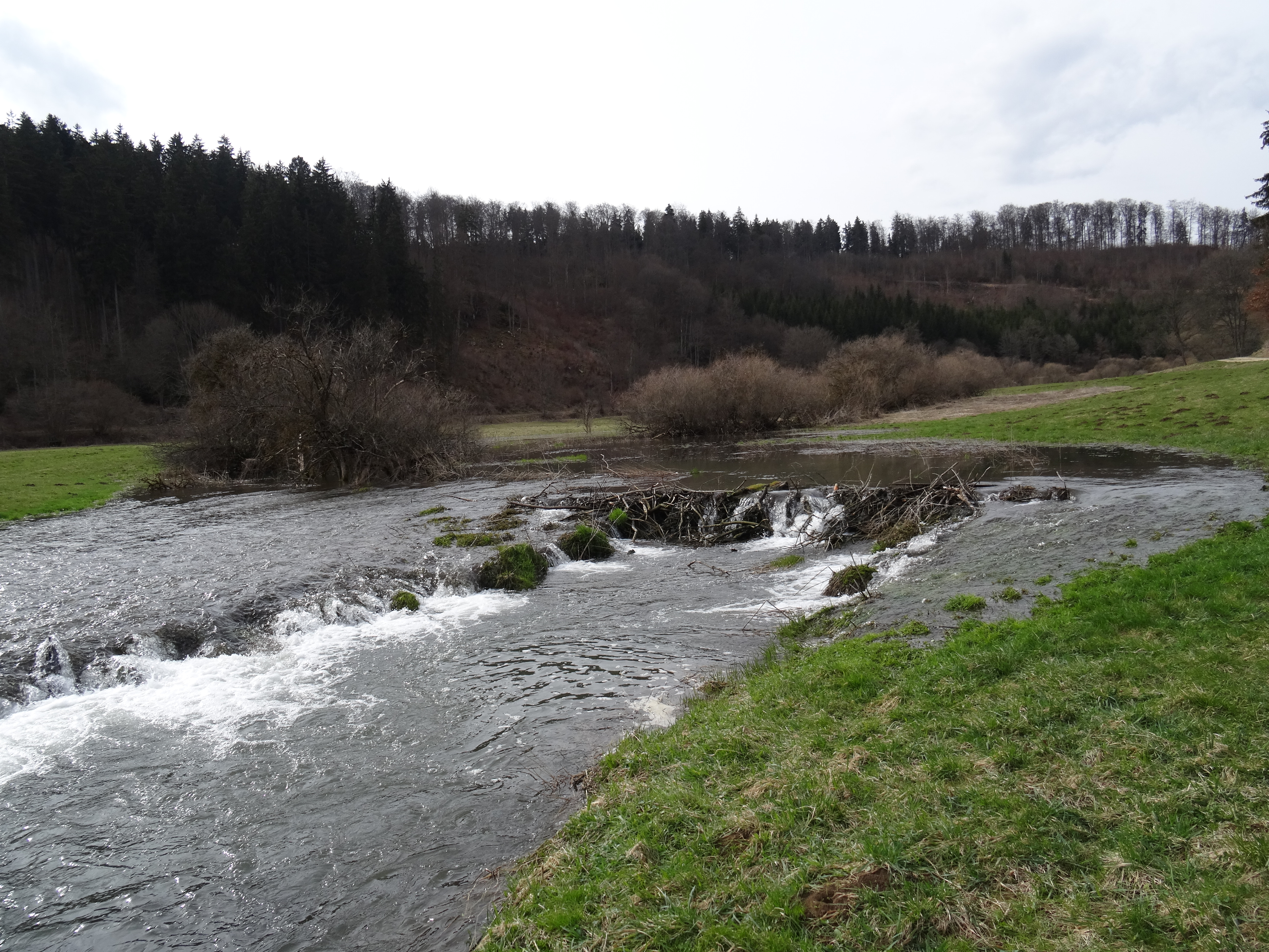 Biberdamm im Fehlatal bei Gammertingen, 2015